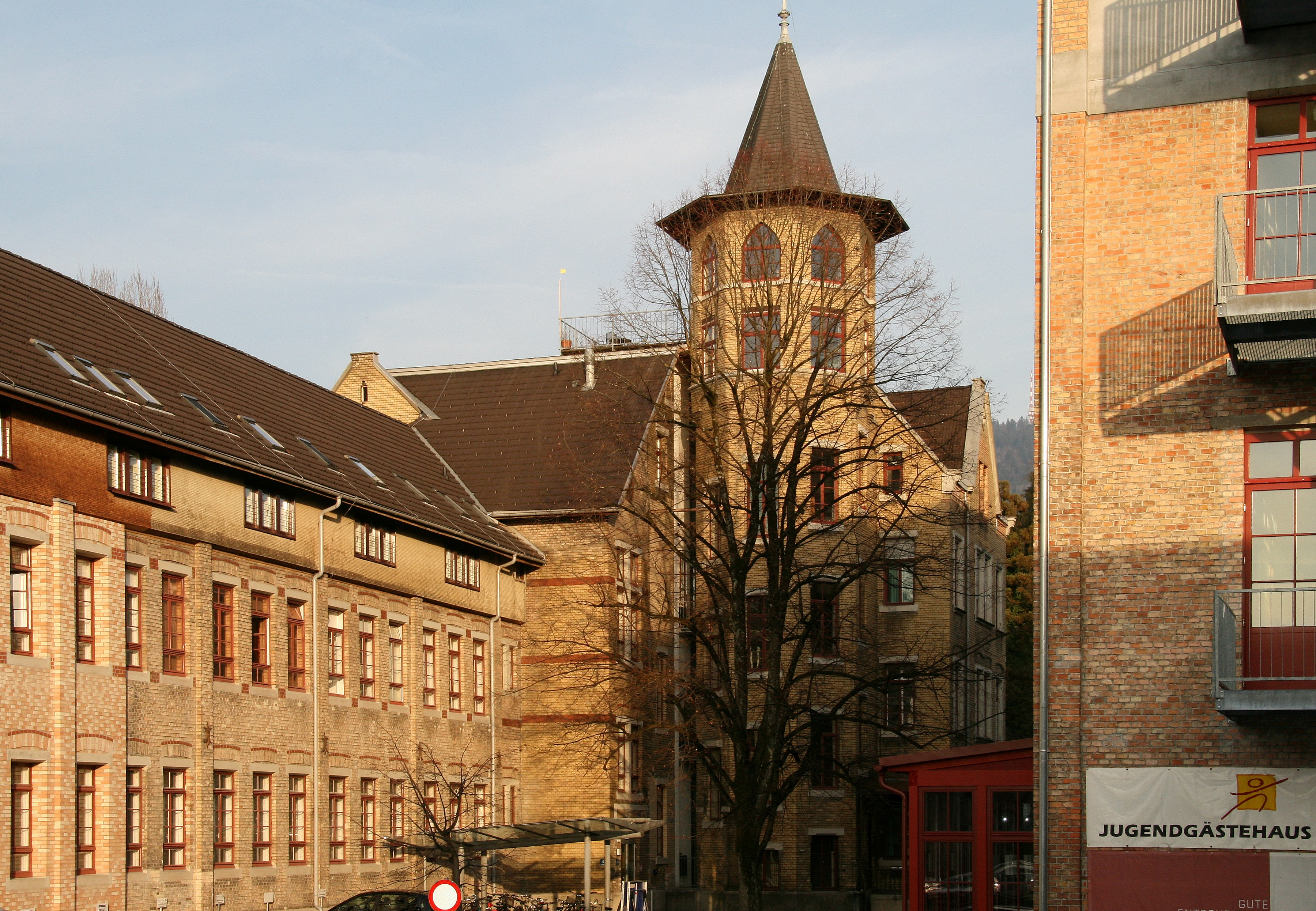 aus dem DEHIO Vorarlberg 1983: Mehrerauer Strasse Nr. 3-5: Fabrik, erbaut 1892 von den Architekten Wittmann & Stahl, Stuttgart. Werksgebäude mit eigenem Verwaltungstrakt, Eisenkonstruktion mit Klinkerfassade, Kreuzgiebel, Turm, Erker, neugotische Details ("Industrieschloß").*** der Webereitrakt (hier nicht im Bild) stammt vom Bregenzer Architekten Otto Mallaun *** in Bregenz, Vorarlberg. *** 2014 Veröffentlicht: Barbara Motter & Barbara Grabher-Schneider "Orte-Fabriken-Geschichten ISBN 978-37099-7097-3